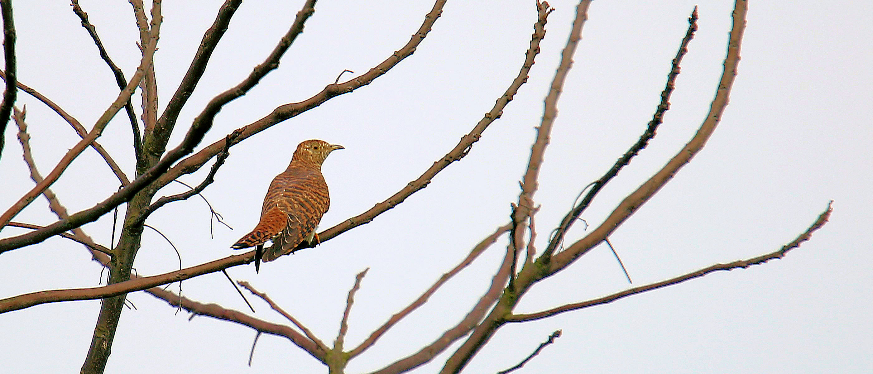 Chim mái chụp tại Yên Mỹ Hà Nội